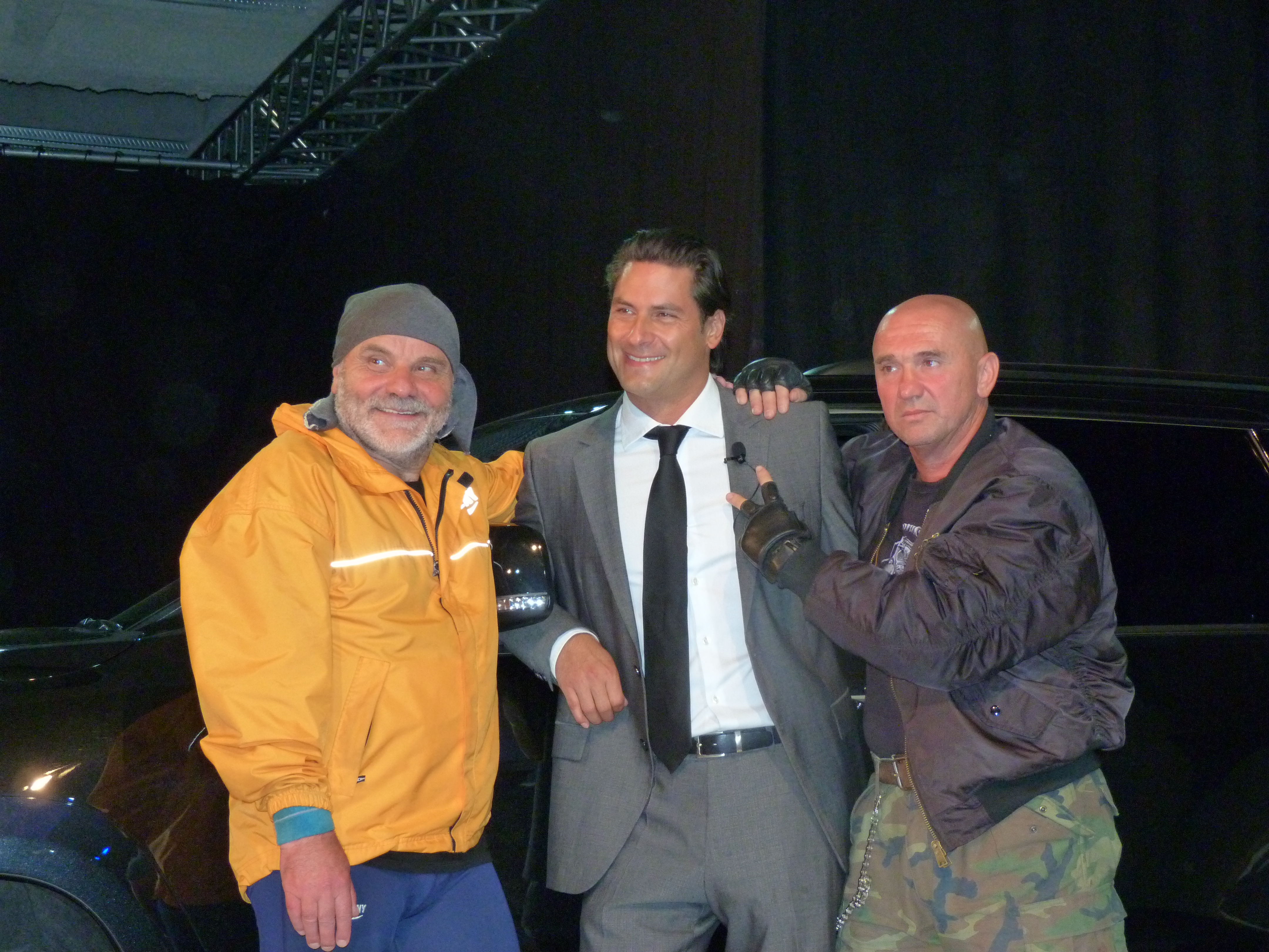 Kovács Lajos, színművész, ? és ?